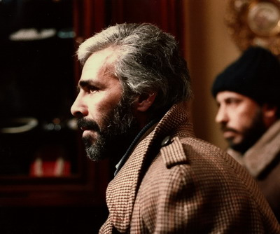 احمد بخشی در کنار علی حاتمی. پشت صحنه سریال هزاردستان